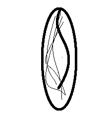 Estructura que migra por los tejido hasta los tentaculos